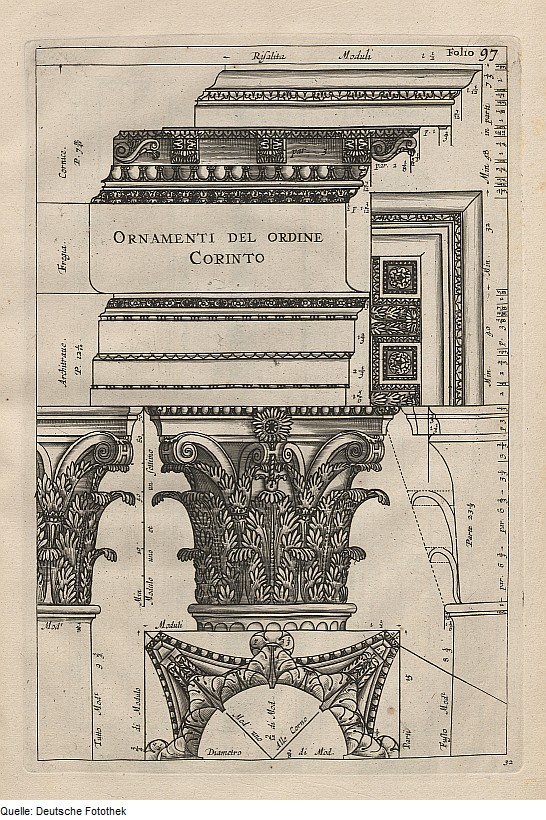 Original image description from the Deutsche Fotothek Architektur & Kapitell & Volute & Akanthus & Gebälk & Architrav